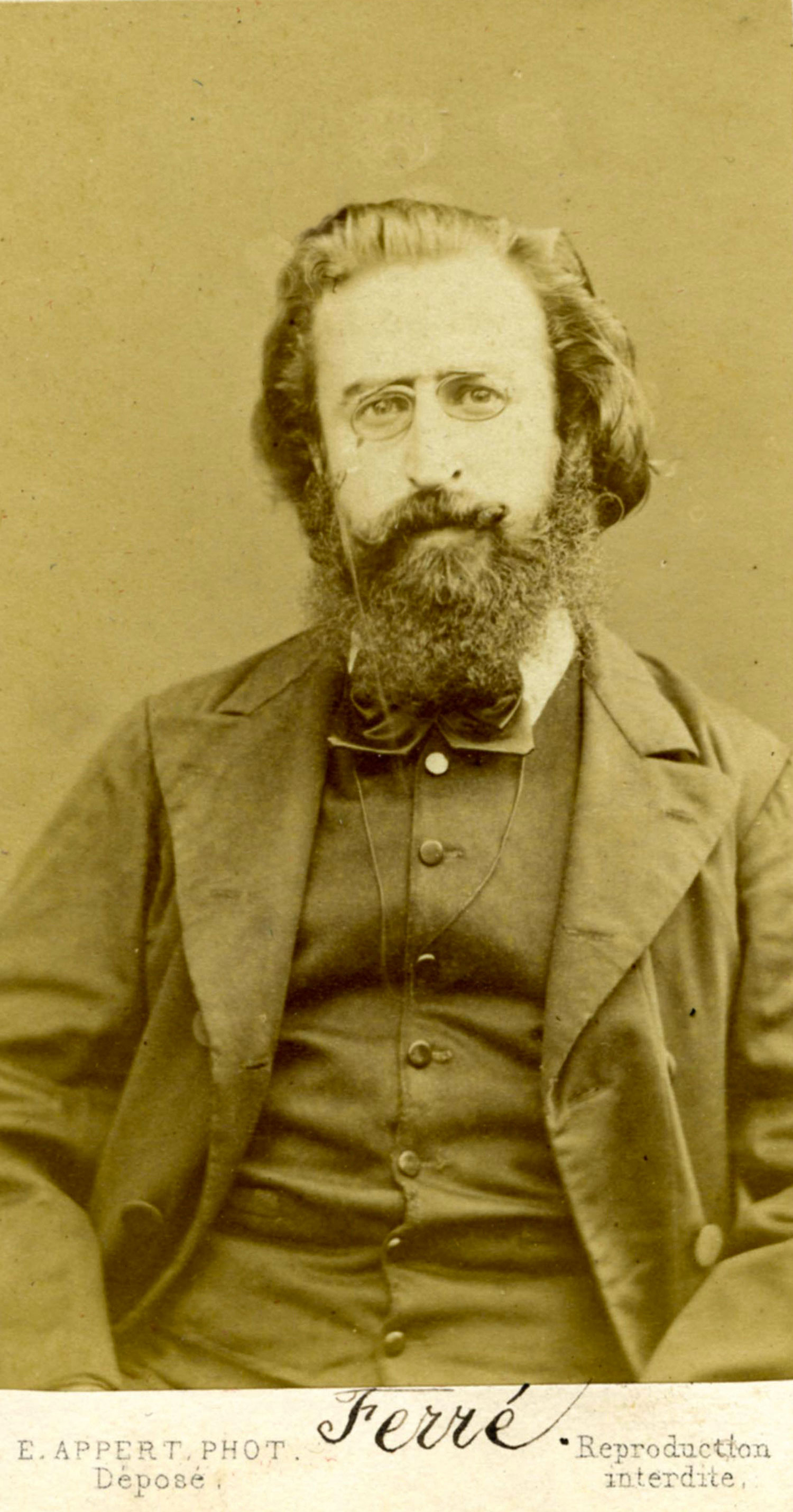 Théophile Ferré photographié par Eugène Appert.